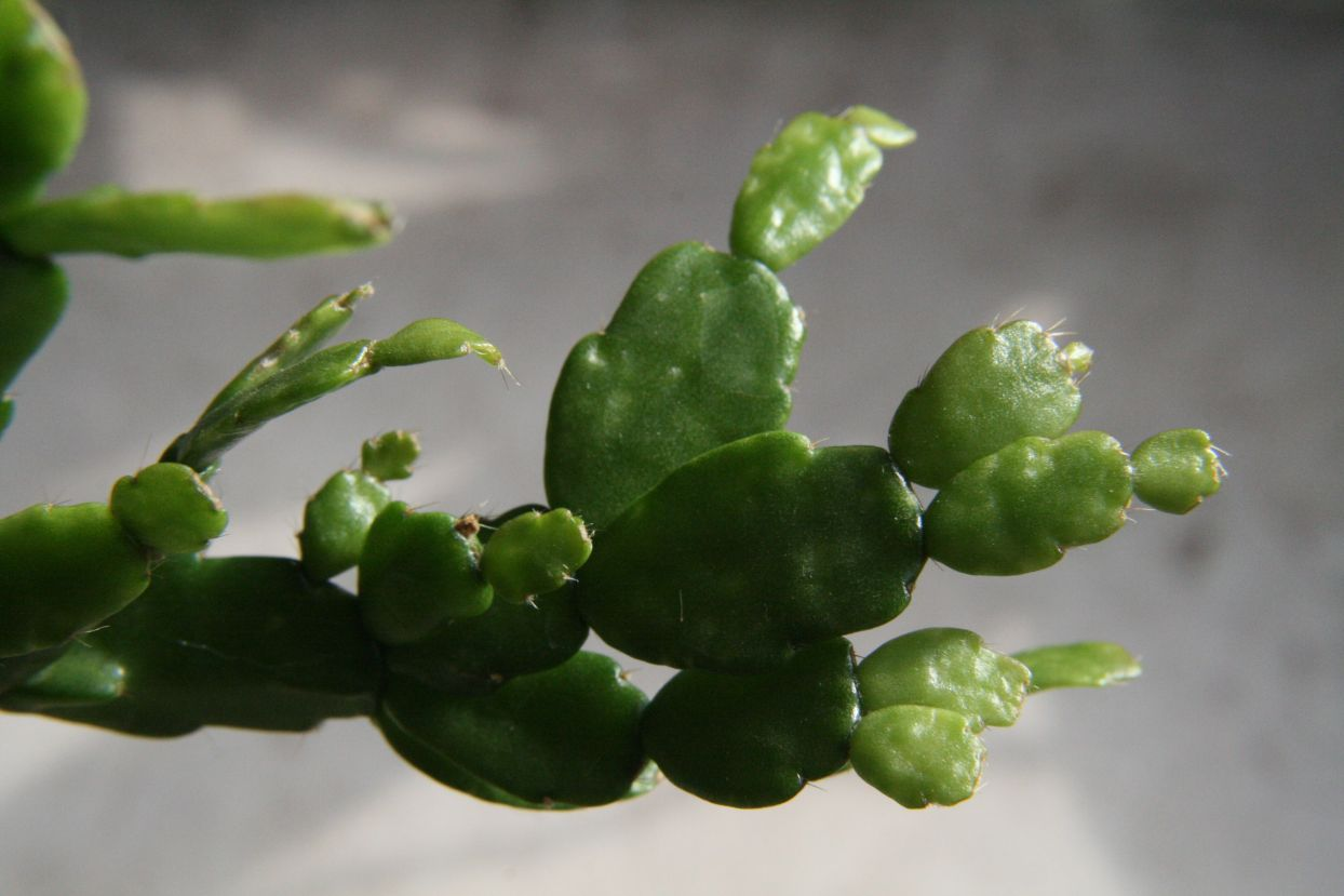 Schlumbergera russelliana clone Typ Ehler